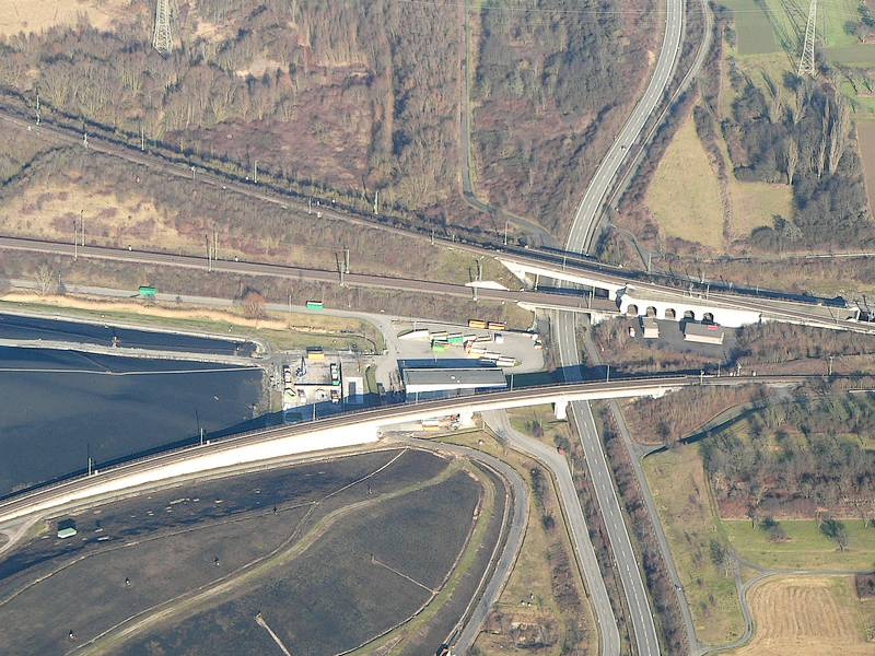 Luftaufnahme der nordwestlichen Zufahrt zum Rollenbergtunnel (Blick Richtung Osten). Die beiden Gleise von der Bahnstrecke aus Heidelberg fädeln in südöstlicher Richtung (nach rechts unten) ein, von unten (Nordwesten) führt das Gleis aus Bruchsal in die Strecke ein. (Multi-level junction system north of Rollenberg Tunnel. The tracks from Heidelberg (up / from north-east) and Bruchsal (buttom / from north-west) join with the high-speed line running from left (north-west / Mannheim) to right (south-east / Stuttgart))